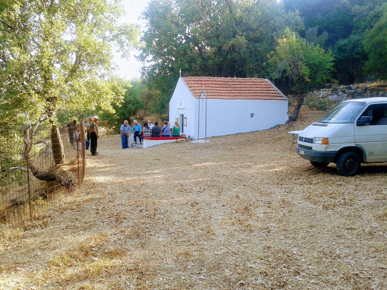 Άγιος Στέφανος